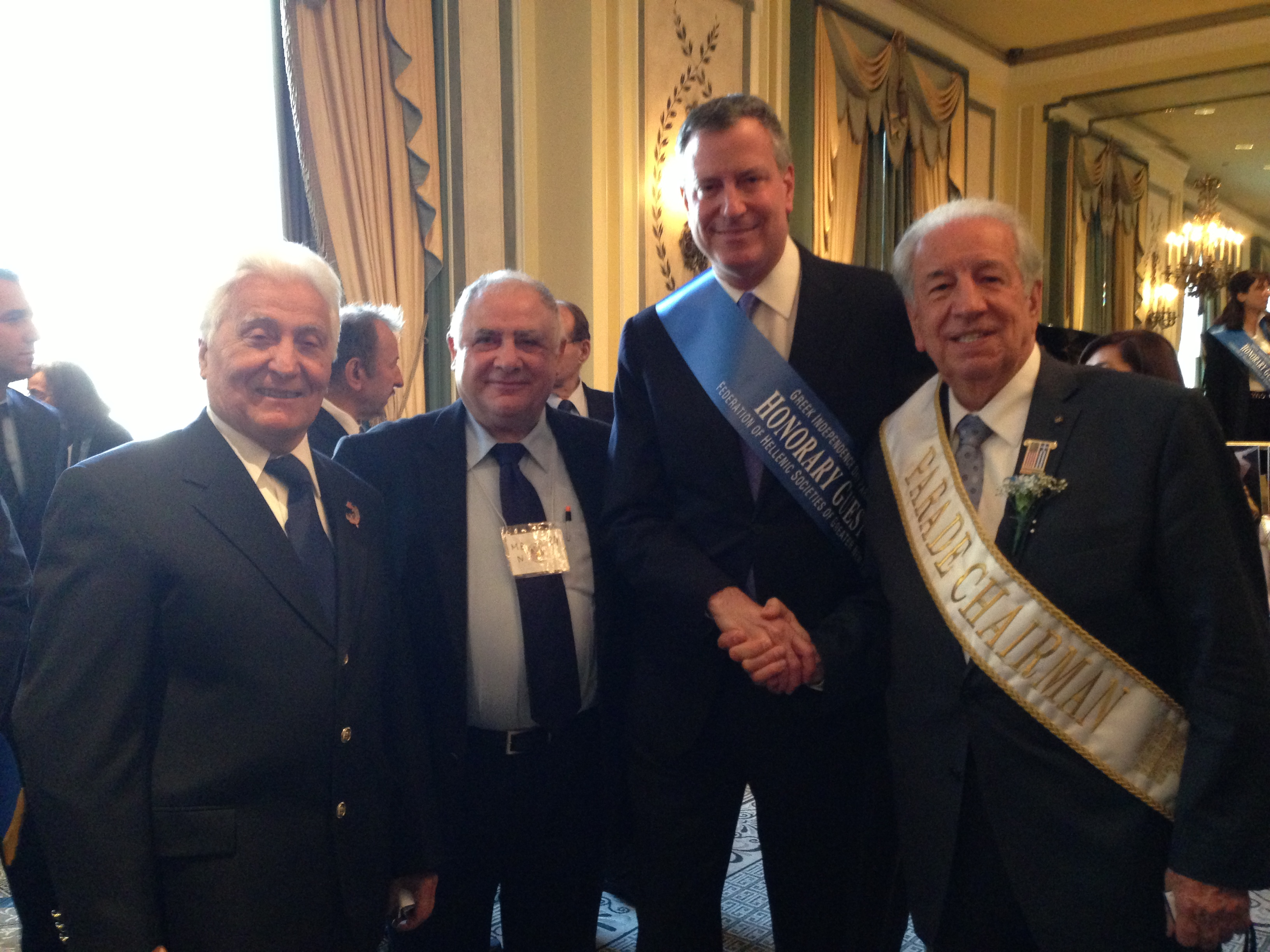 Manhattan, NY | 4.7.13